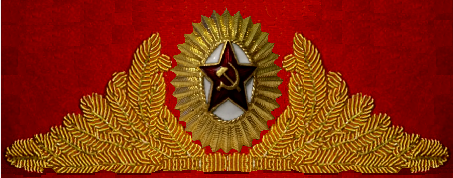 Кокарда оф орпк